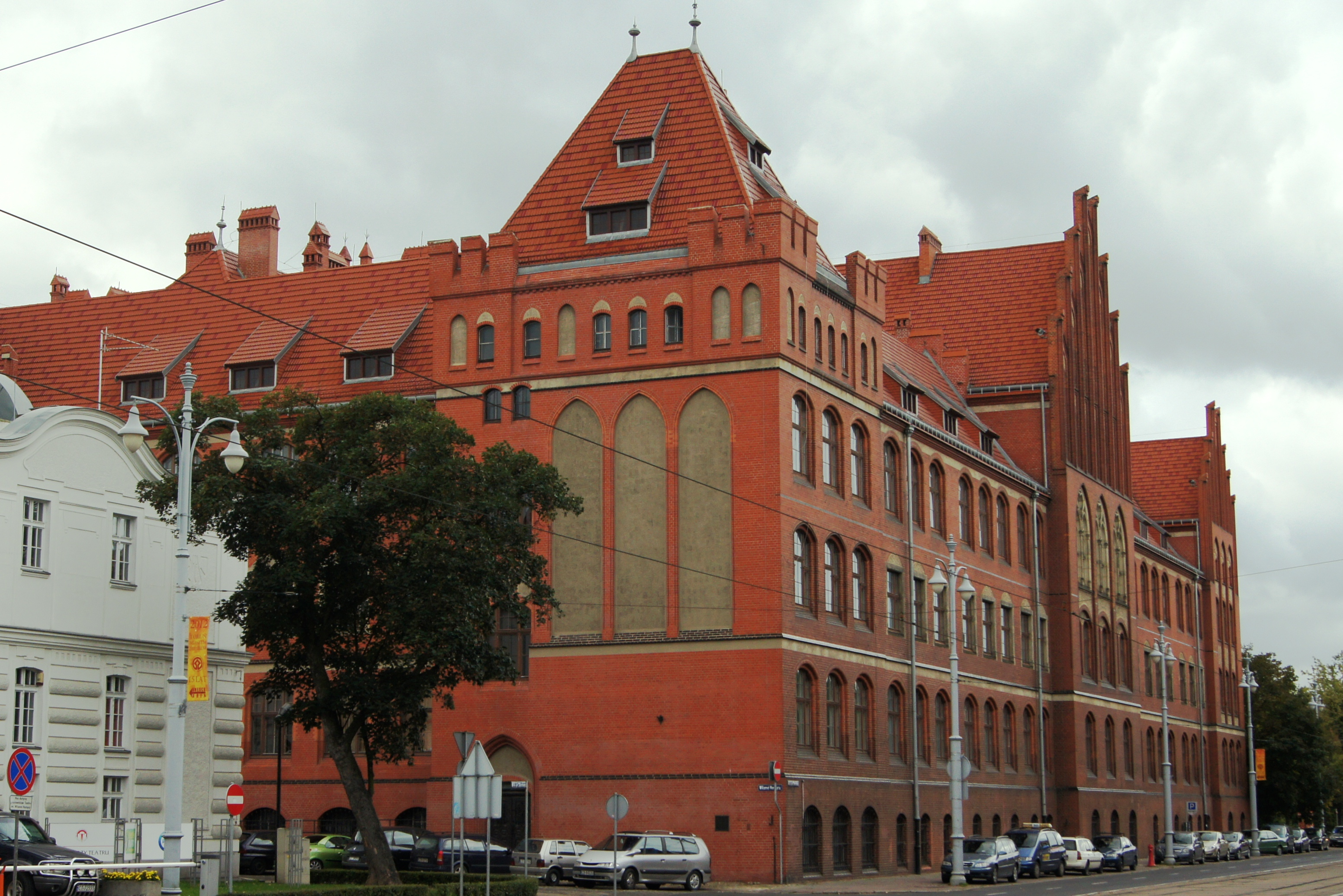 Toruń, ul. Fosa Staromiejska 3 - dawna Szkoła Przemysłowa, obecnie Collegium Maius UMK, 1907; ogrodzenie, mur/met (zabytek nr rejestr. A/509/1-2)